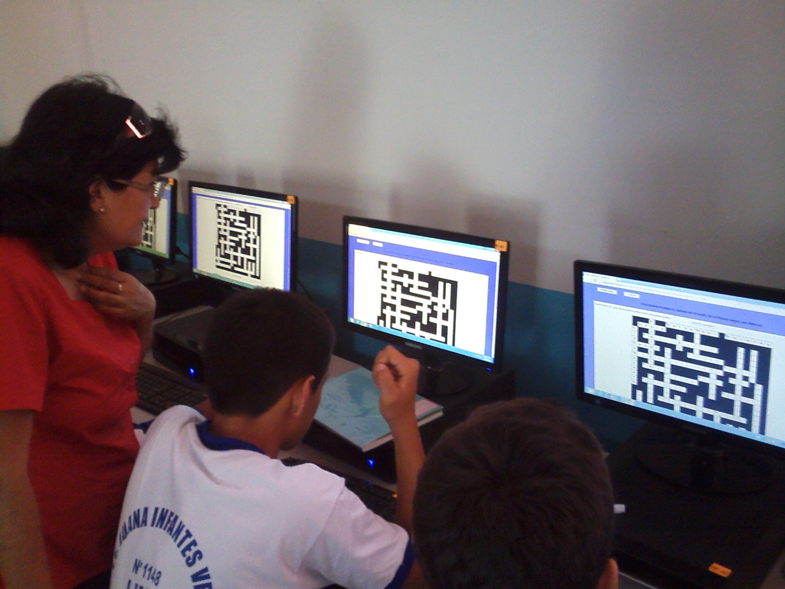 Aprovechamos los recursos informáticos, y las actividades ludicas en nuestras clases, haciendo crucigramas on line en la clase de religión.